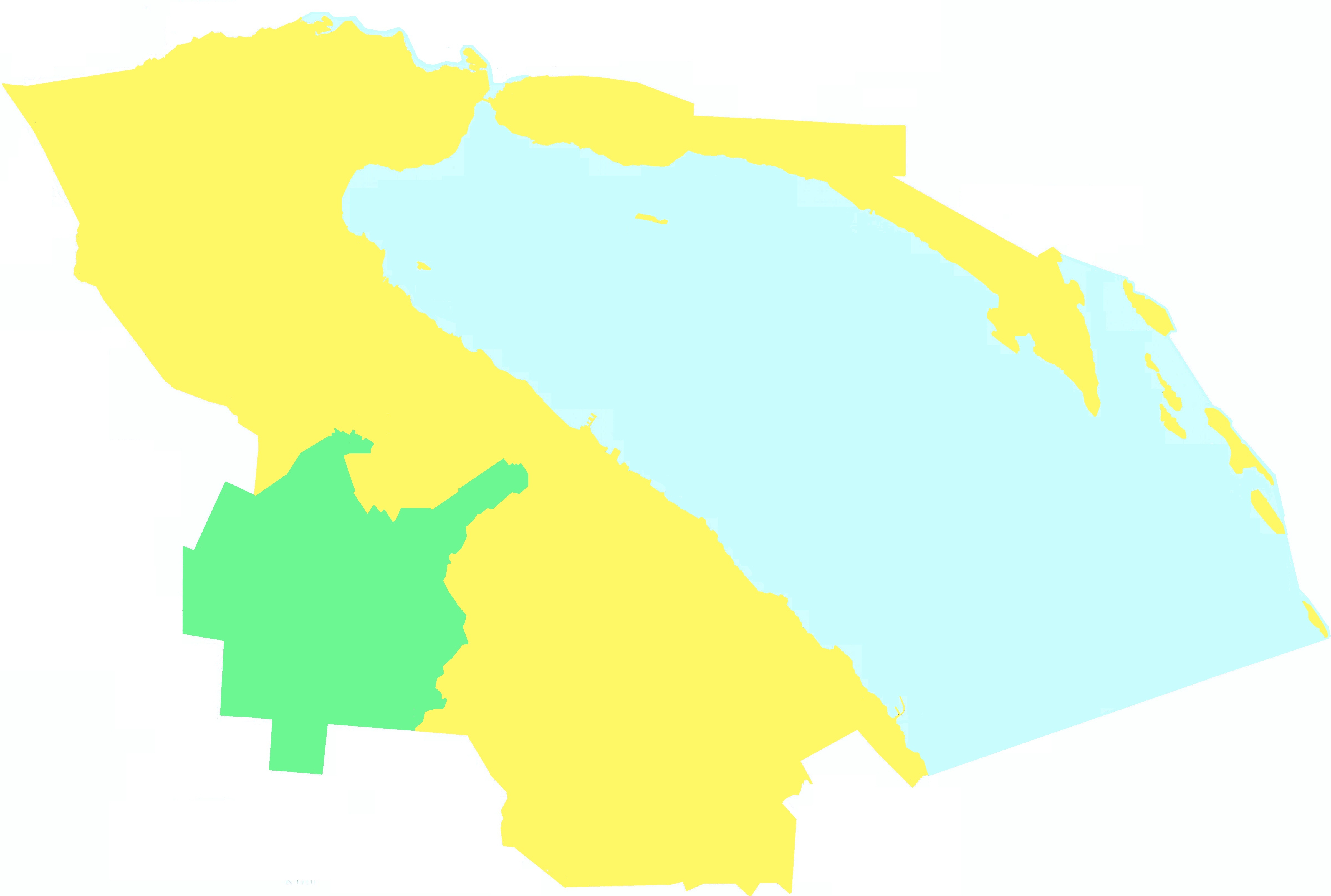 Древлянка на карте Петрозаводска